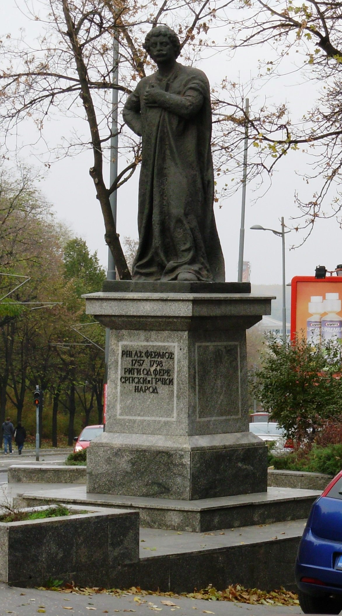 Рига од Фере, споменик поред Калемегдана, Београд. Сликао Голдфингер